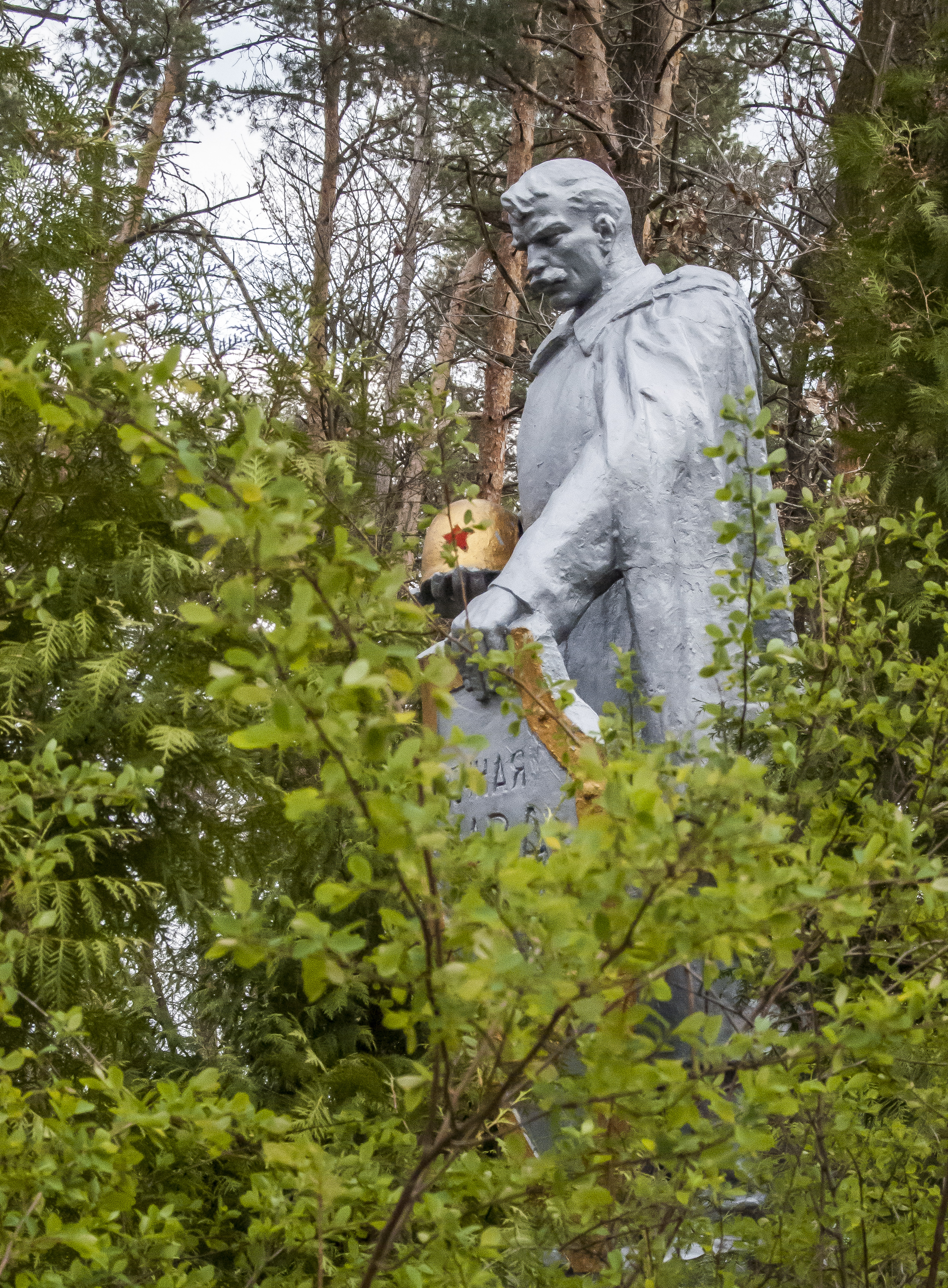 Памятник воинам Великой Отечественной Войны.